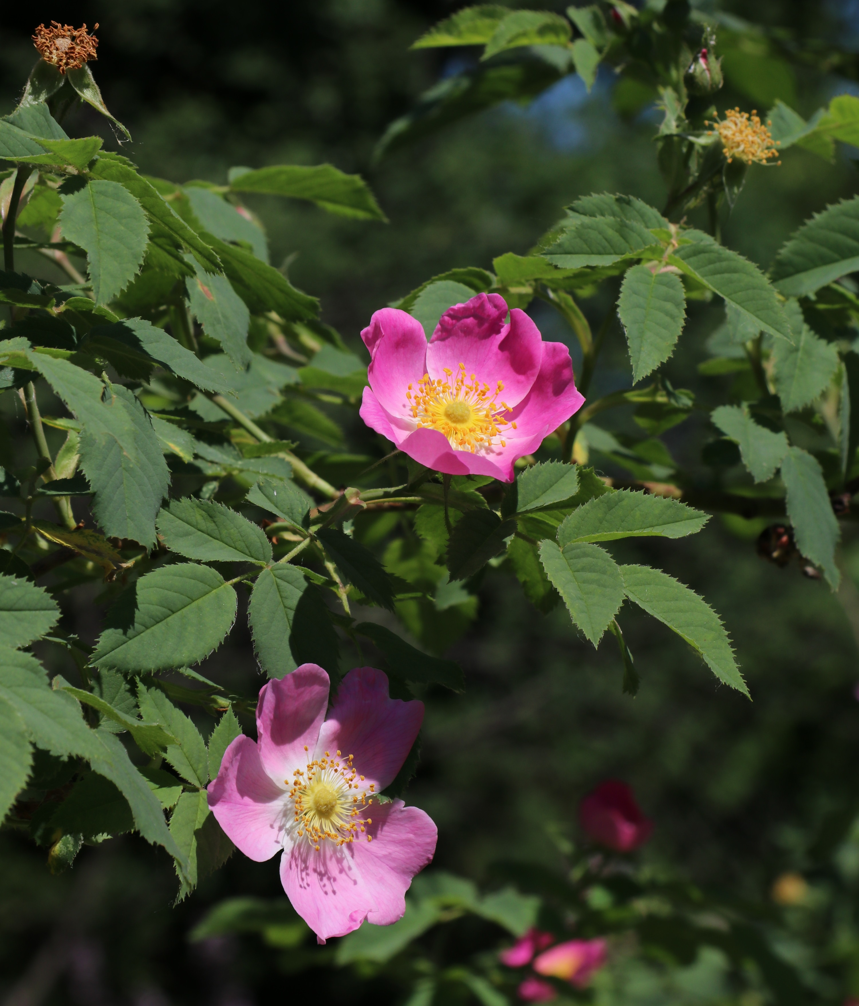 Rosa jundzillii im Botanischen Garten Dresden